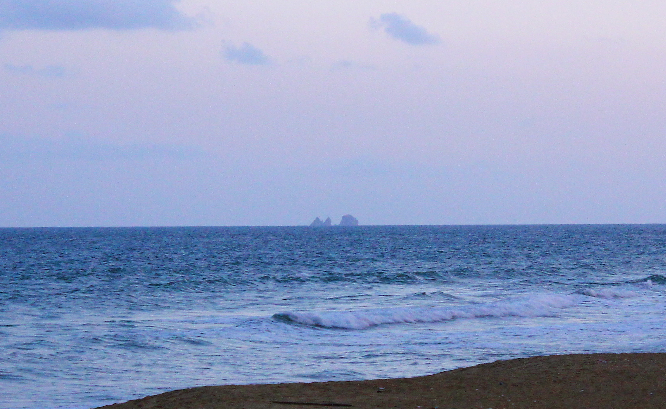 中国海南省陵水黎族自治县香水湾和双帆石。